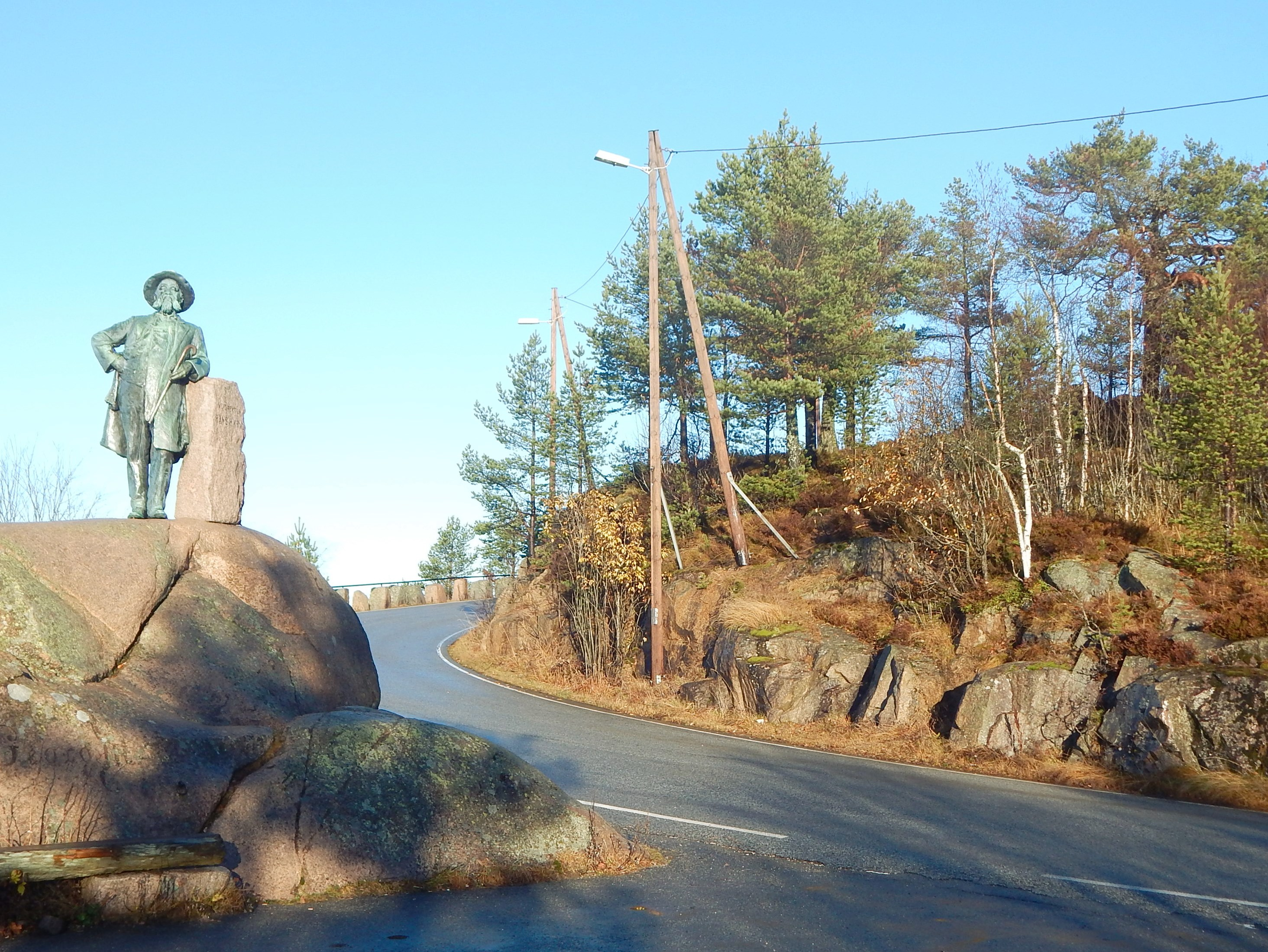 Voksenkollveien ved Kragstøtten